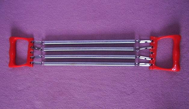 Ekspander